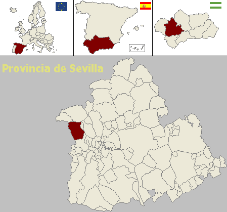 Mapa de situación del municipio sevillano de Aznalcóllar (Andalucía, España)